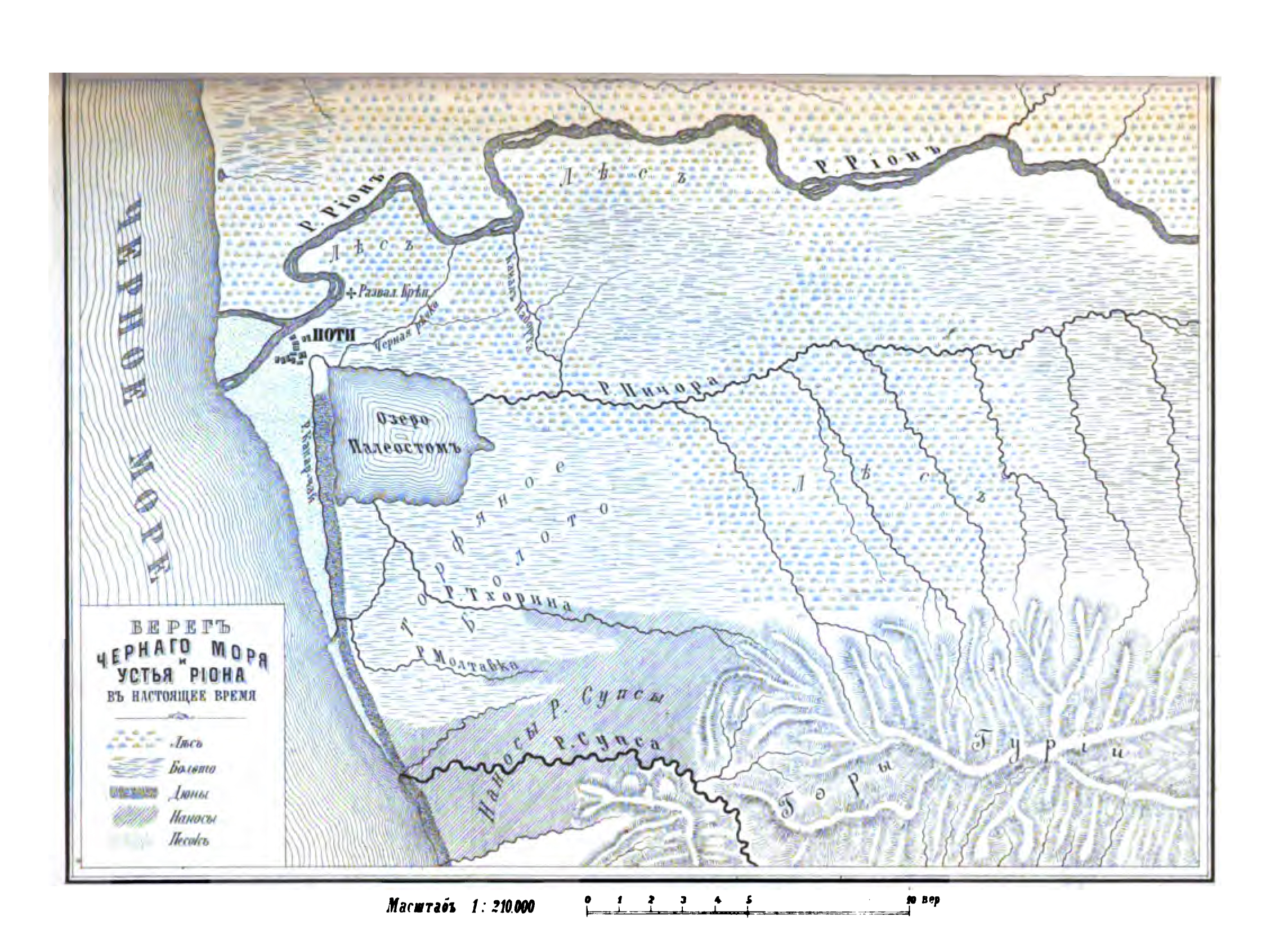 პალიასტომის ტბა 1882 წელს